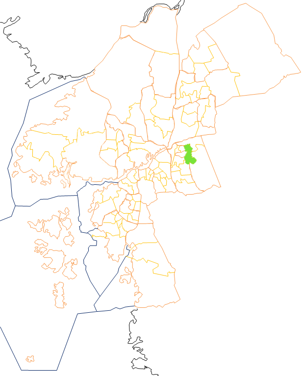 Karta som visar primärområdes belägenhet i Göteborg